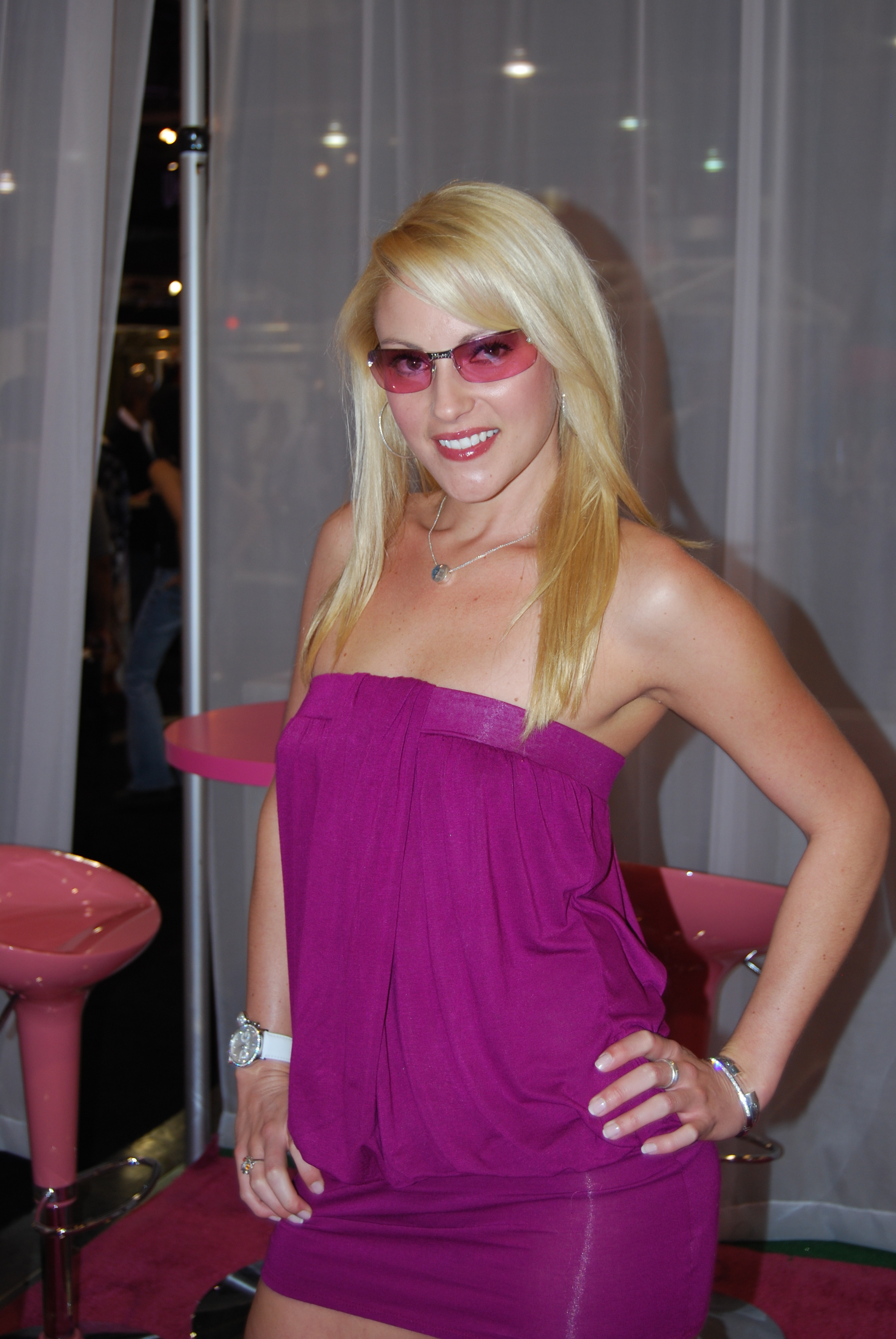 AEE2008_Nikon_Day2 109